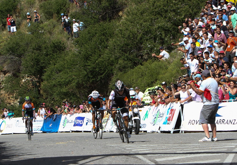 Final de la 6ª etapa del Tour de San Luis 2014.